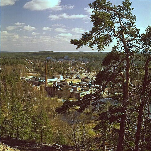 Silverdalen. Bilden troligen från slutet av 1960-talet.